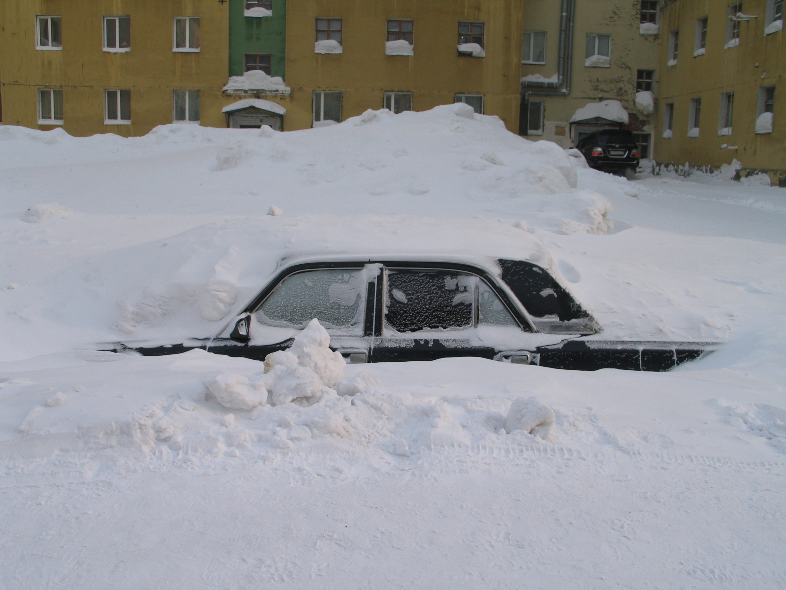 Заваленная снегом машина в Норильске